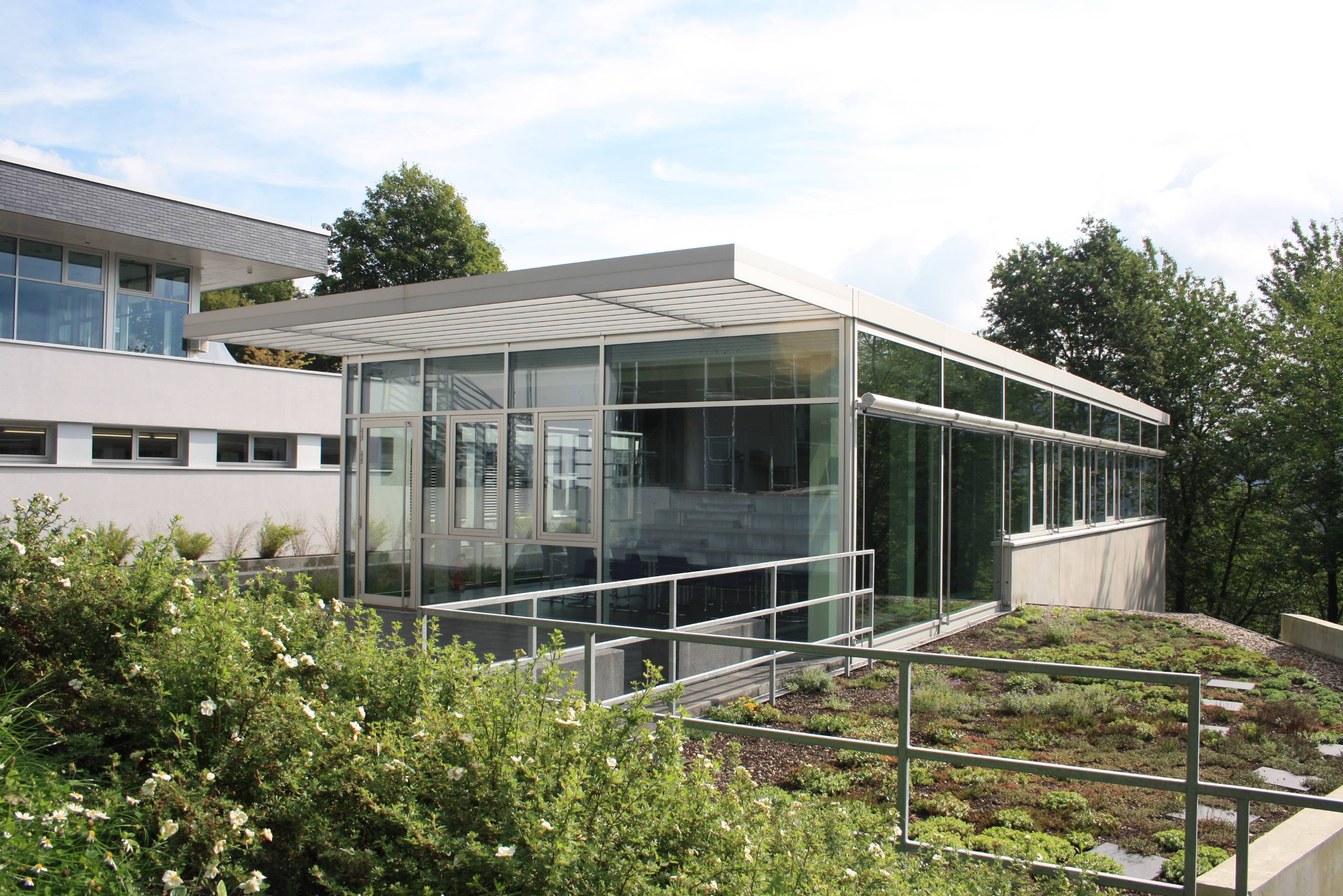 Neubau aus dem Jahr 2009